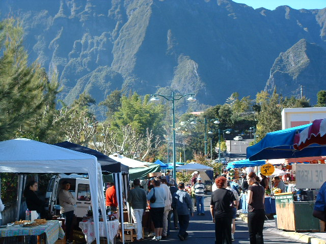 Cilaos, (La Réunion) marché forain, juin 2006 Cilaos, (Réunion island, France) public market, june 2006 Own work